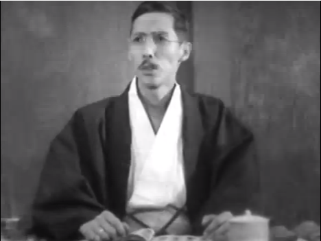 『東京の合唱』、1931年